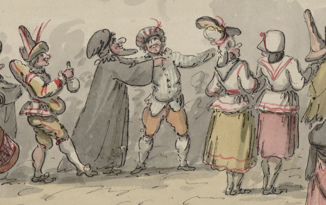 Détail d'un dessin de Béricourt conservé à la BNF.